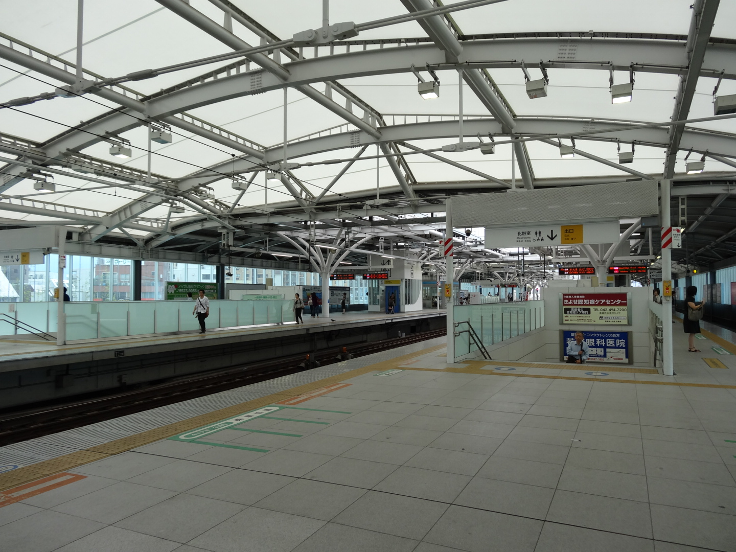 Syakujii-koen-station-platform 2013/10/10